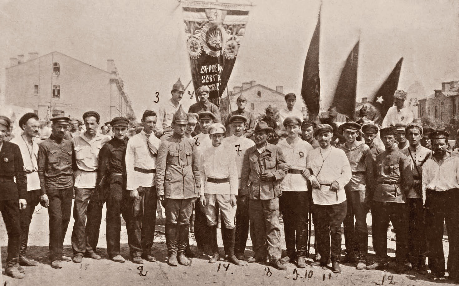 У Сальянских казарм в Баку на параде в честь годовщины 11-й армии, 14 августа 1920 г.: На фото председатель ЦК АКП(б) М.Д.Б. оглы Гусейнов (2), член Реввоенсовета Кавказского фронта Г. К. Орджоникидзе (3), командарм М. И. Василенко (4), И.А. Недзвецкий (5), начальник полевого штаба 11-й армии В.М. Воронков (6), председатель СНК Азербайджанской ССР Нариман Нариманов (8), руководитель отряда бронепоездов в ходе Бакинской операции, кавалер ордена Красного знамени Азербайджанской ССР № 1, впоследствии Герой Российской Федерации (посмертно) М.Г. Ефремов (9), бывший генерал А.Г. Габаев (11), заместитель военного комиссара группы бронепоездов в ходе Бакинской операции П. А. Друганов (12), бывший народный комиссар по военным и морским делам Азербайджанской ССР Ч. Ильдрым (13), Л. Мирзоев (15). Между Василенко и Ильдрымом верхом народный комиссар по военным и морским делам Азербайджанской ССР А. Г. Караев (в белой рубахе и фуражке).